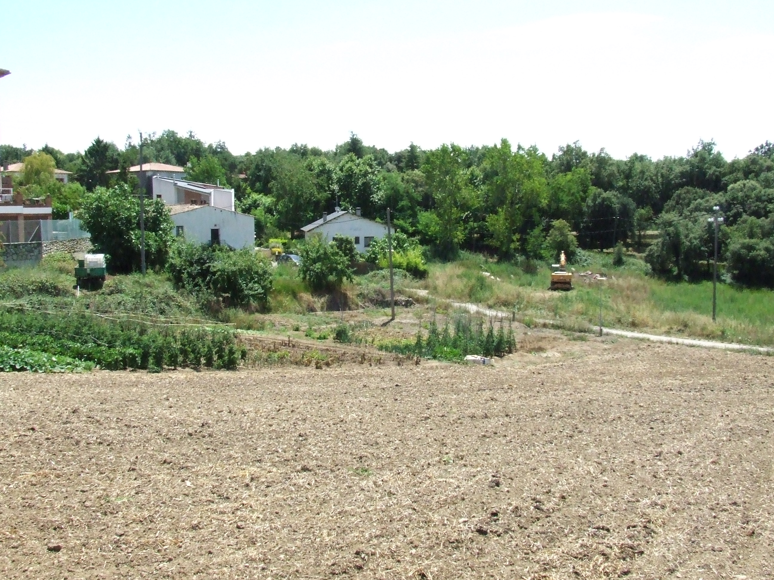 El Sot de les Mules (Castellcir, Moianès)